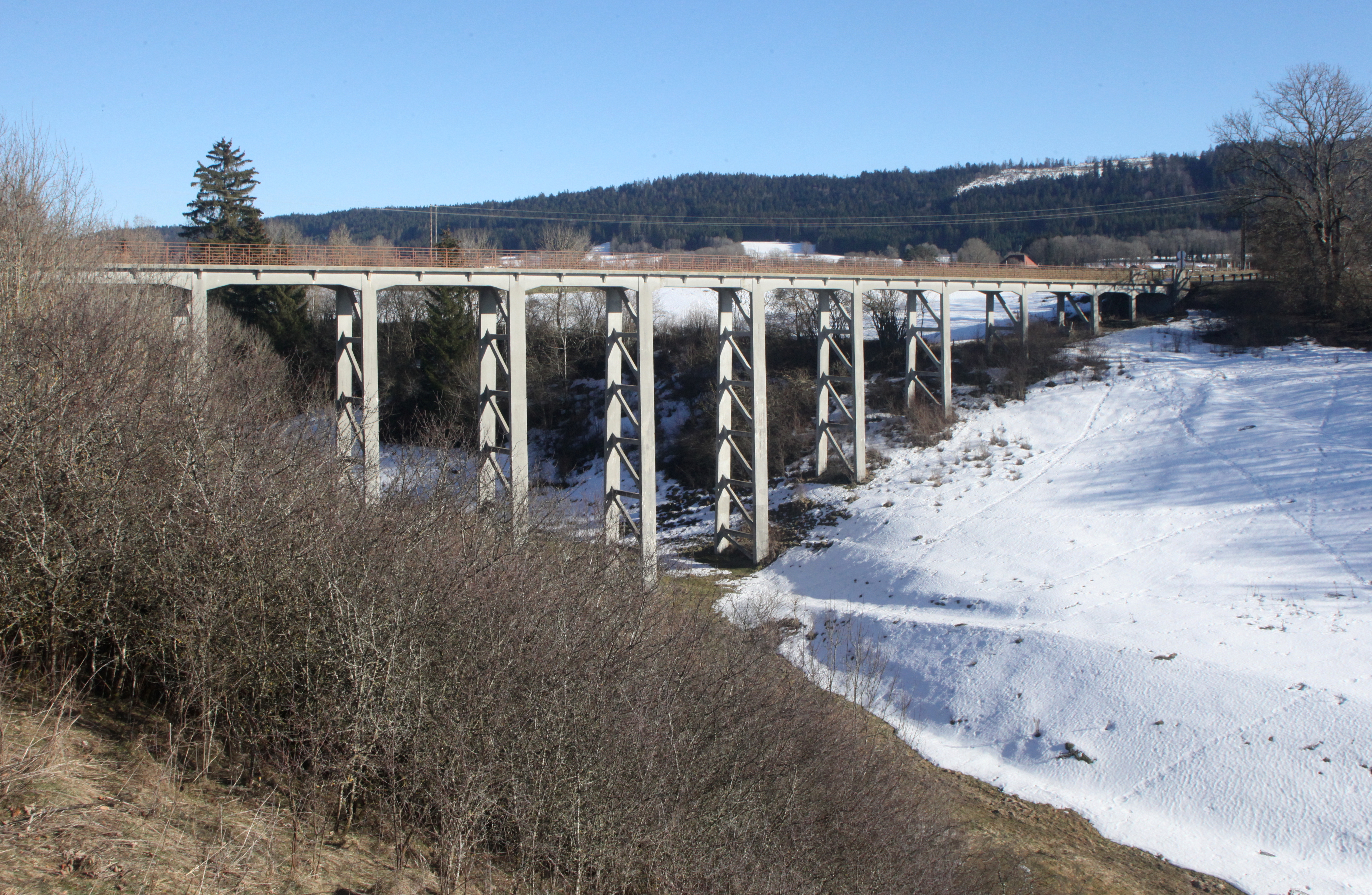 Pont de Montbéliardot.